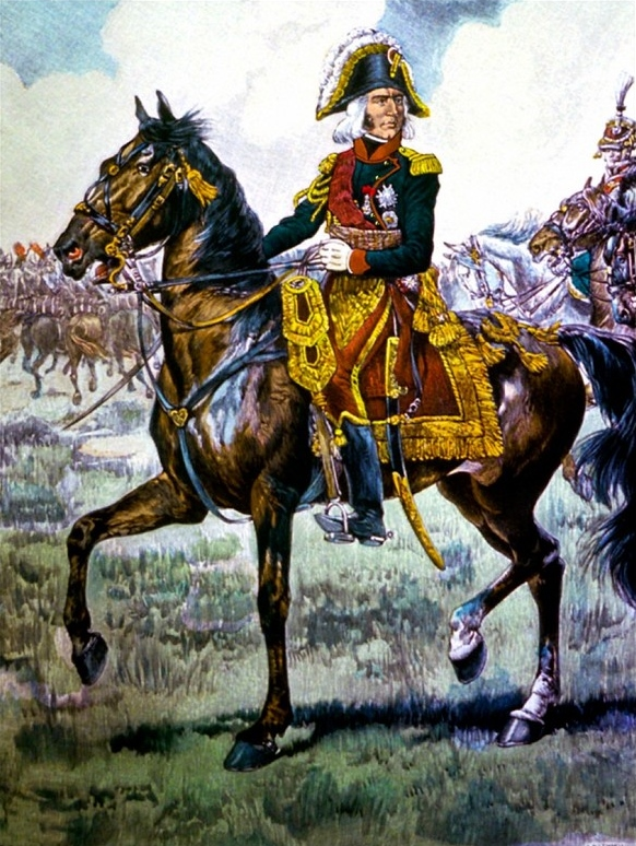 Jean-Baptiste Bessières (1768-1813), maréchal d'Empire et duc d'Istrie, colonel-général de la cavalerie de la Garde impériale.